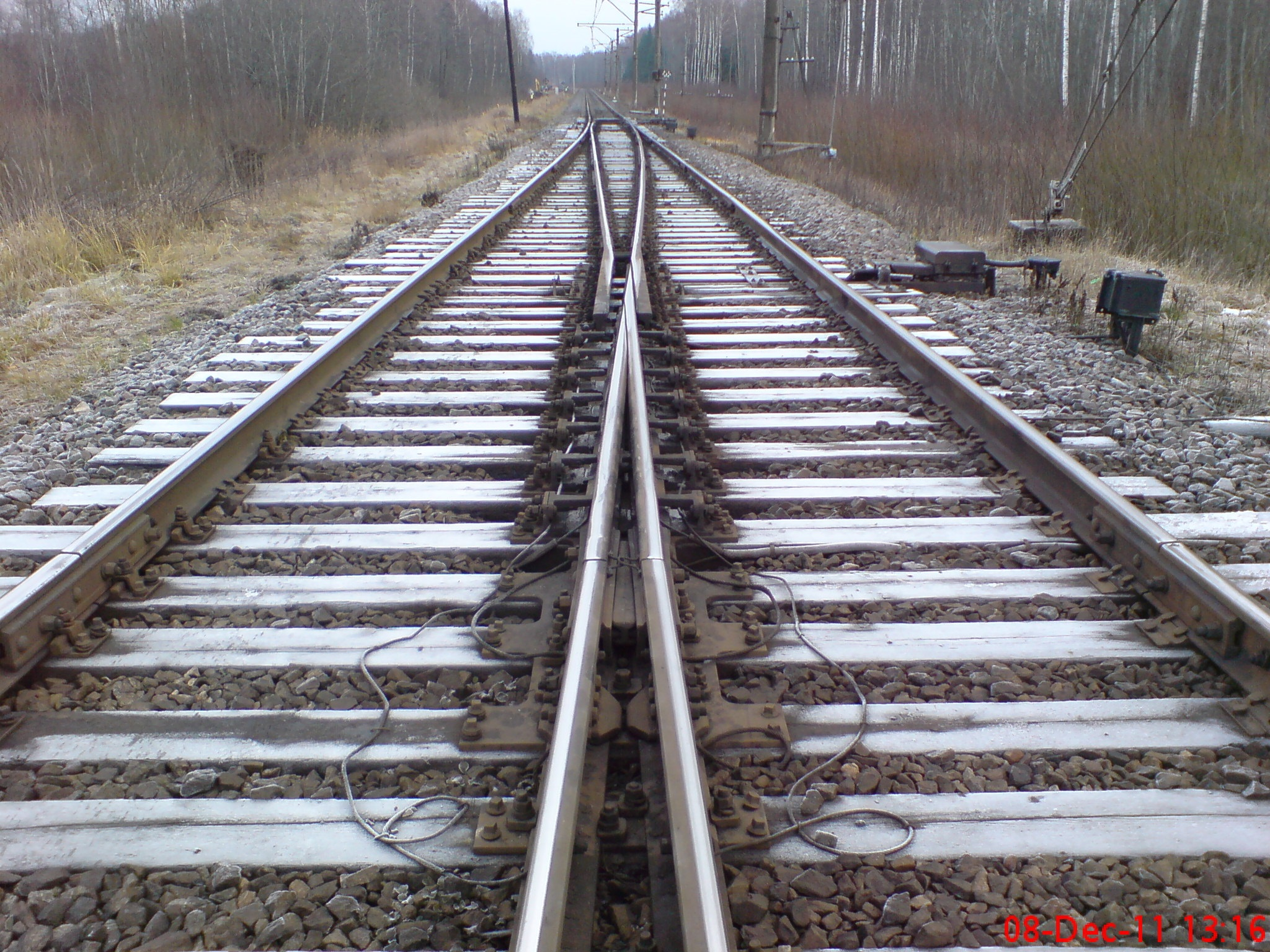 Pārmiju pārveda 1/18 ar kustīgu serdi uz koka brusām